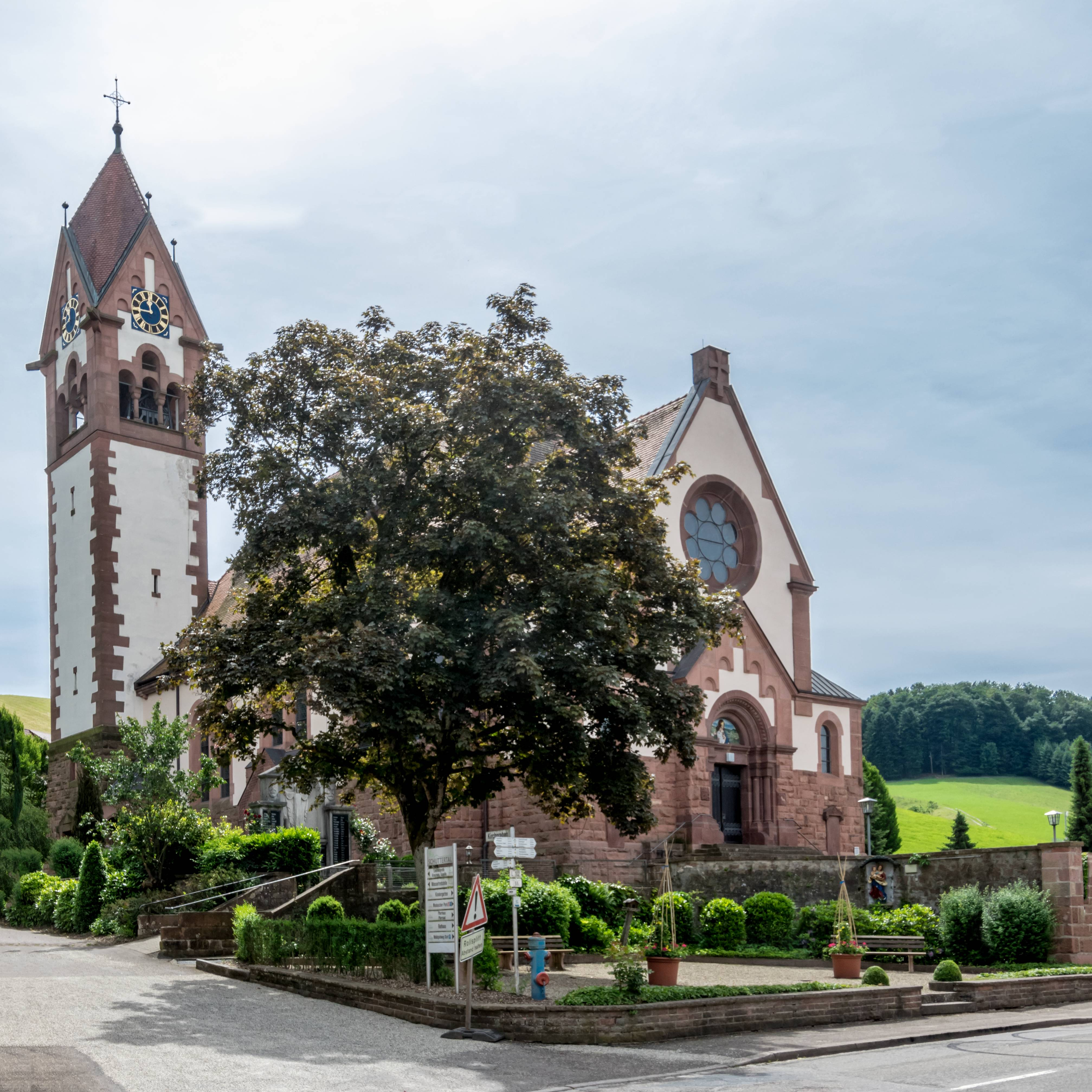 Bilder von der Kirche St Antonius in Schuttertal Außenansicht der Kirche